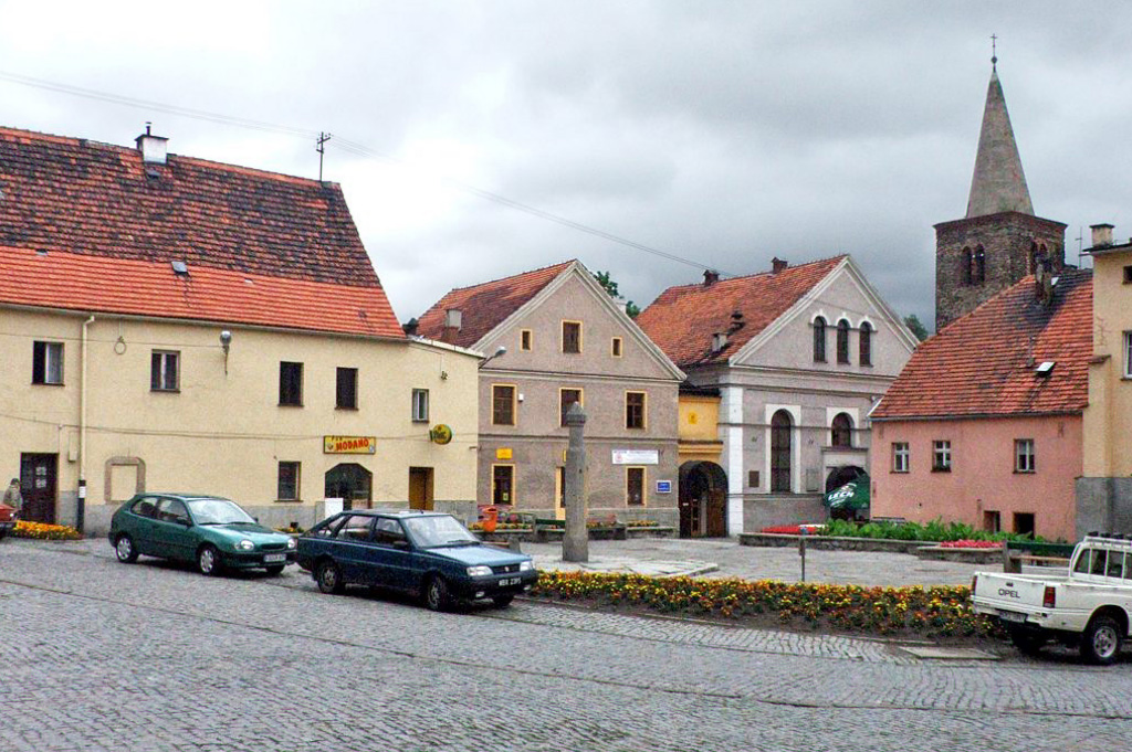 Kleiner Markplatz mit Staupsäule in Bystrzyca Kłodzka (Habelschwerdt) (Woiwodschaft Niederschlesien. Ehemalige evangelische Kirche, heute Streichholzmuseum und Ritterturm (14. Jahrhundert))